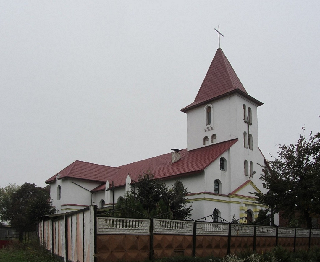 Краявіды Камянца